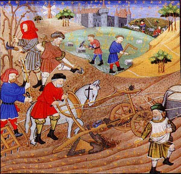 Trata-se de pessoas utilizando dos mais diversos métodos de agrícolas para realização de plantações e colheitas.